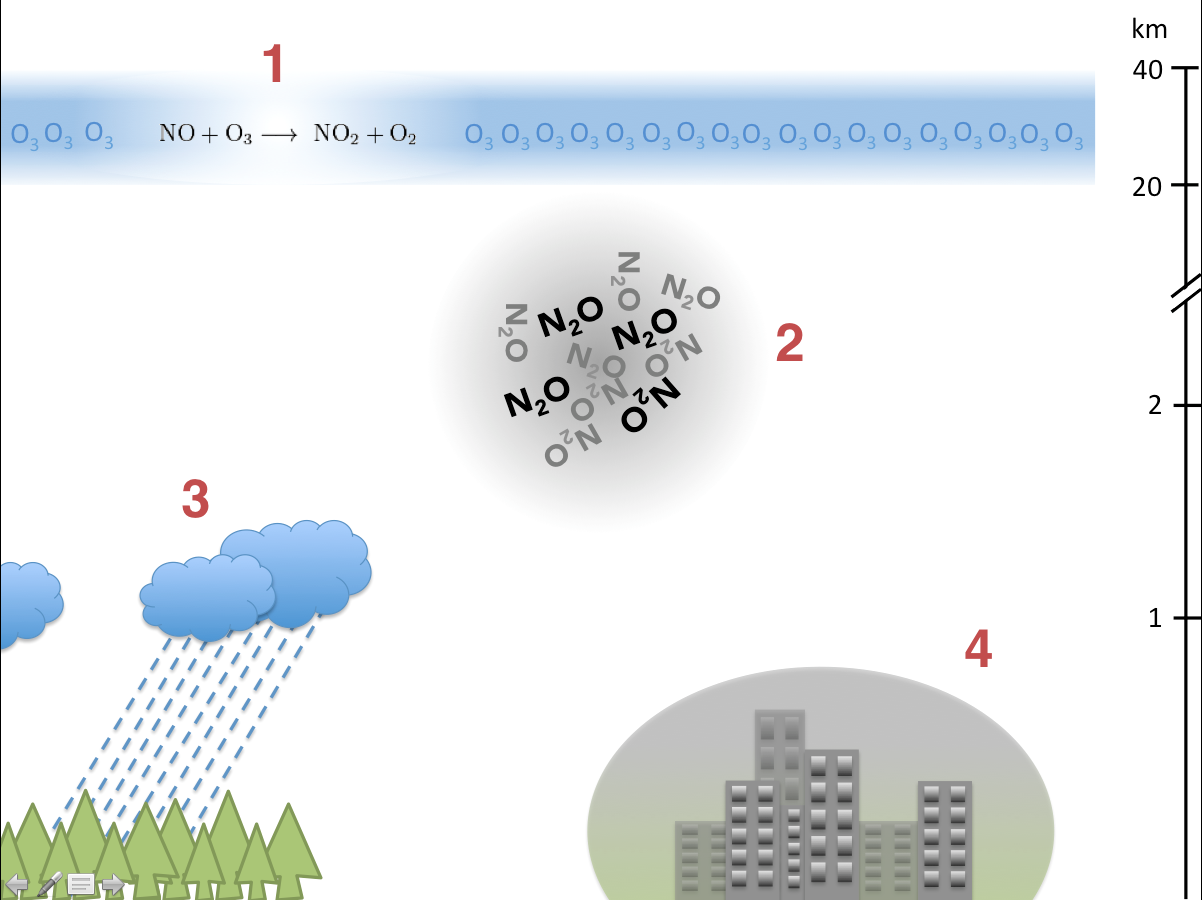 Wirkungen von Stickoxiden in der Atmosphäre